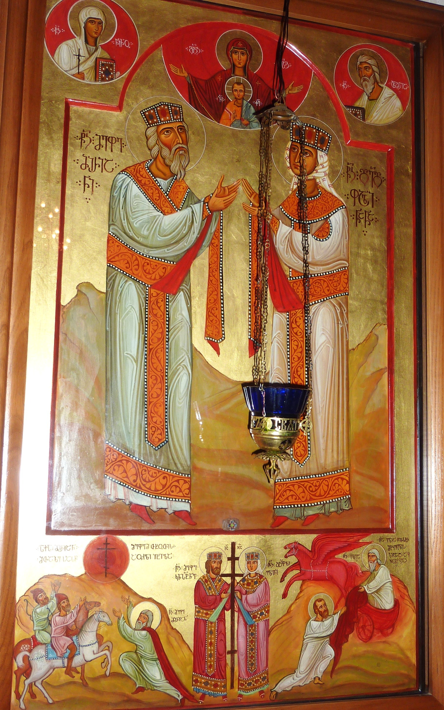 Le premier roi chrétien de Géorgie, Miria III, et son épouse (cathédrale de Santavissi)